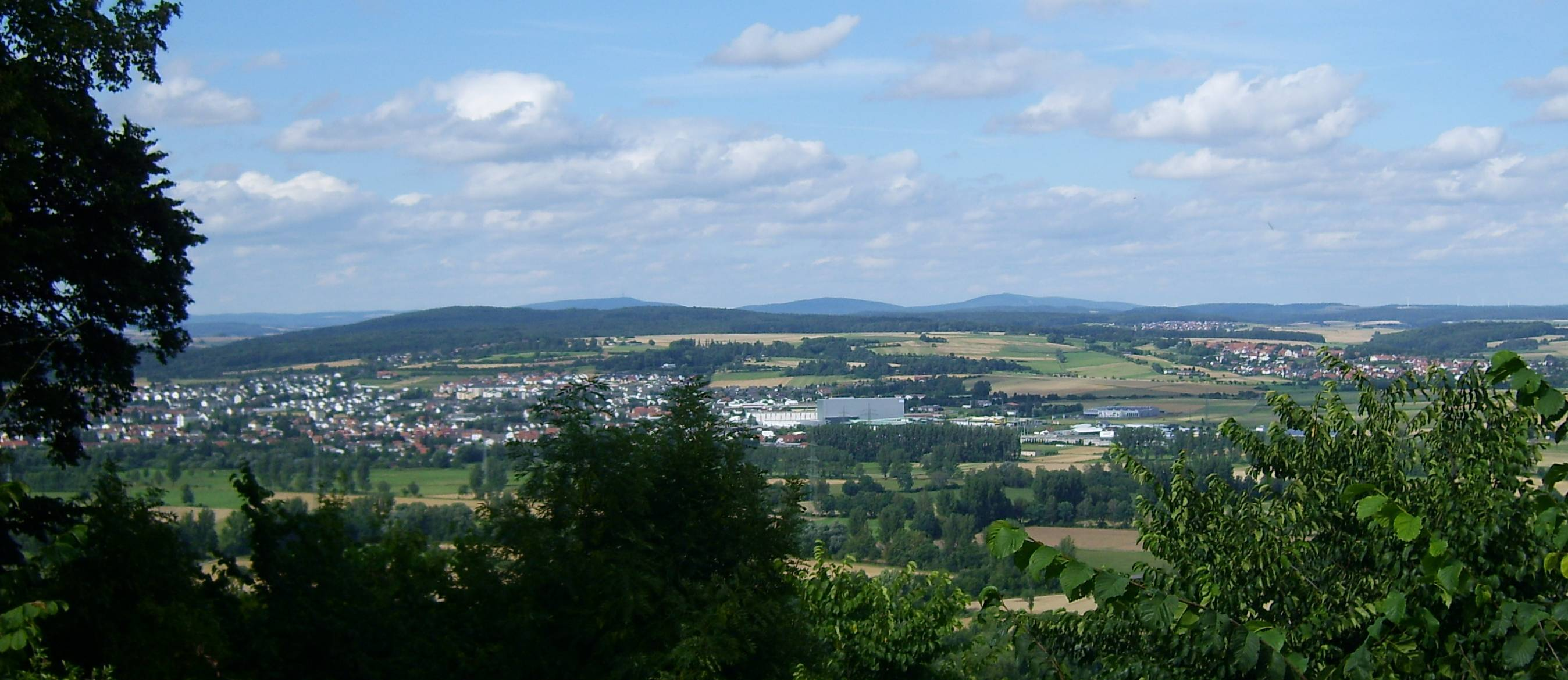 Blick von der Amöneburg auf die Gilserberger Höhen mit dem 380m hohen Burgholz (links) und auf den dahinter liegenden Kellerwald mit dem 657m hohen Hohen Lohr (links, Fernsehturm), dem 585m hohen Jeust (Mitte) und dem 675m hohen Wüstegarten (rechts). Links im Vordergrund die Stadt Kirchhain.